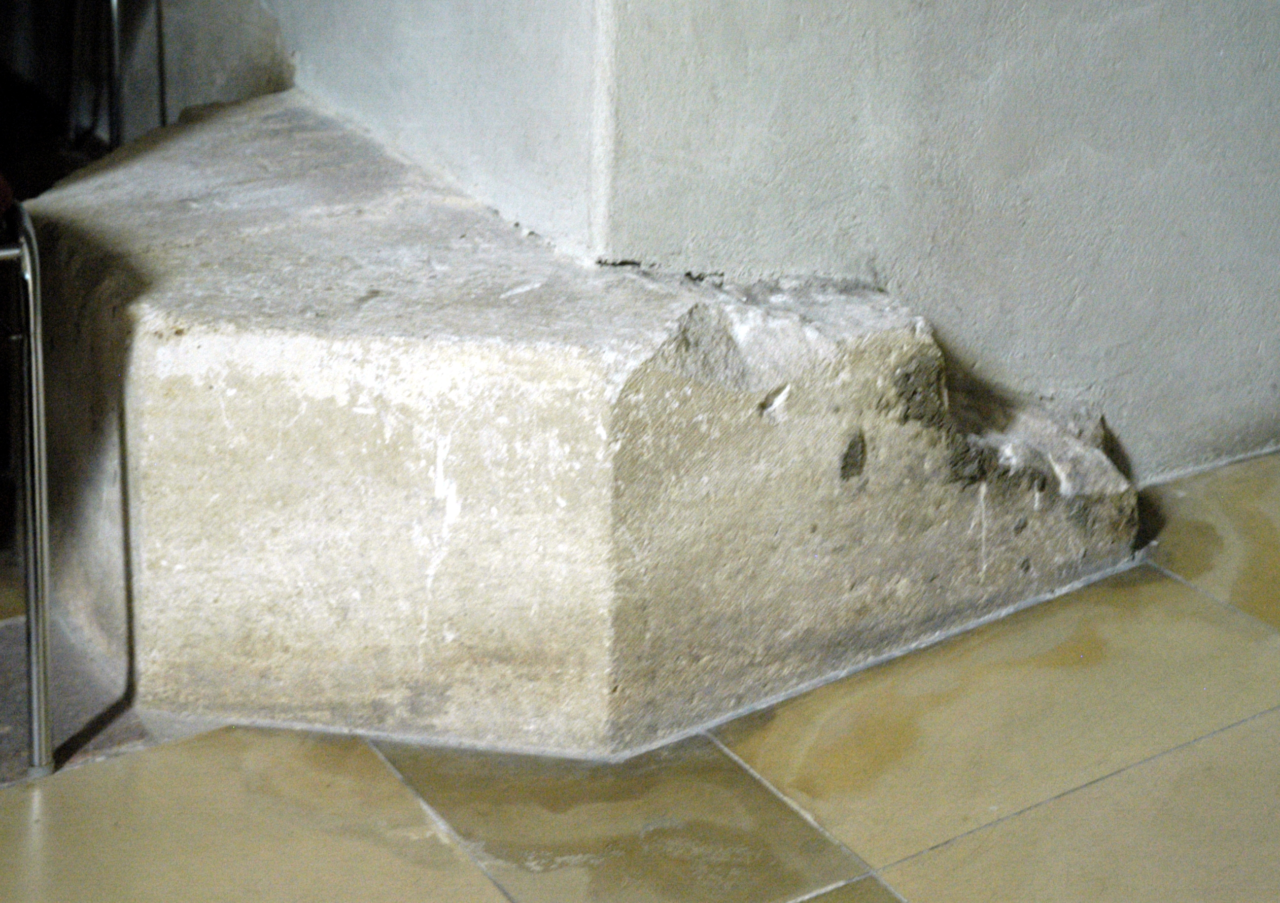 katholische Pfarrkirche heiliger Ulrich - gotischer Mauerrest